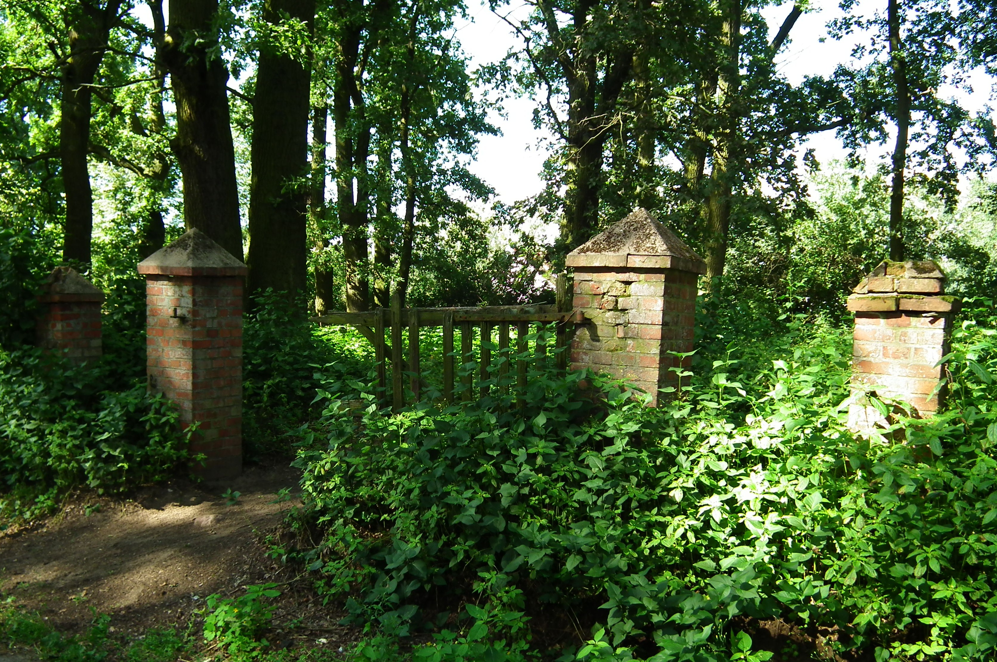 Dawny cm. ewang. w Uścikówcu.